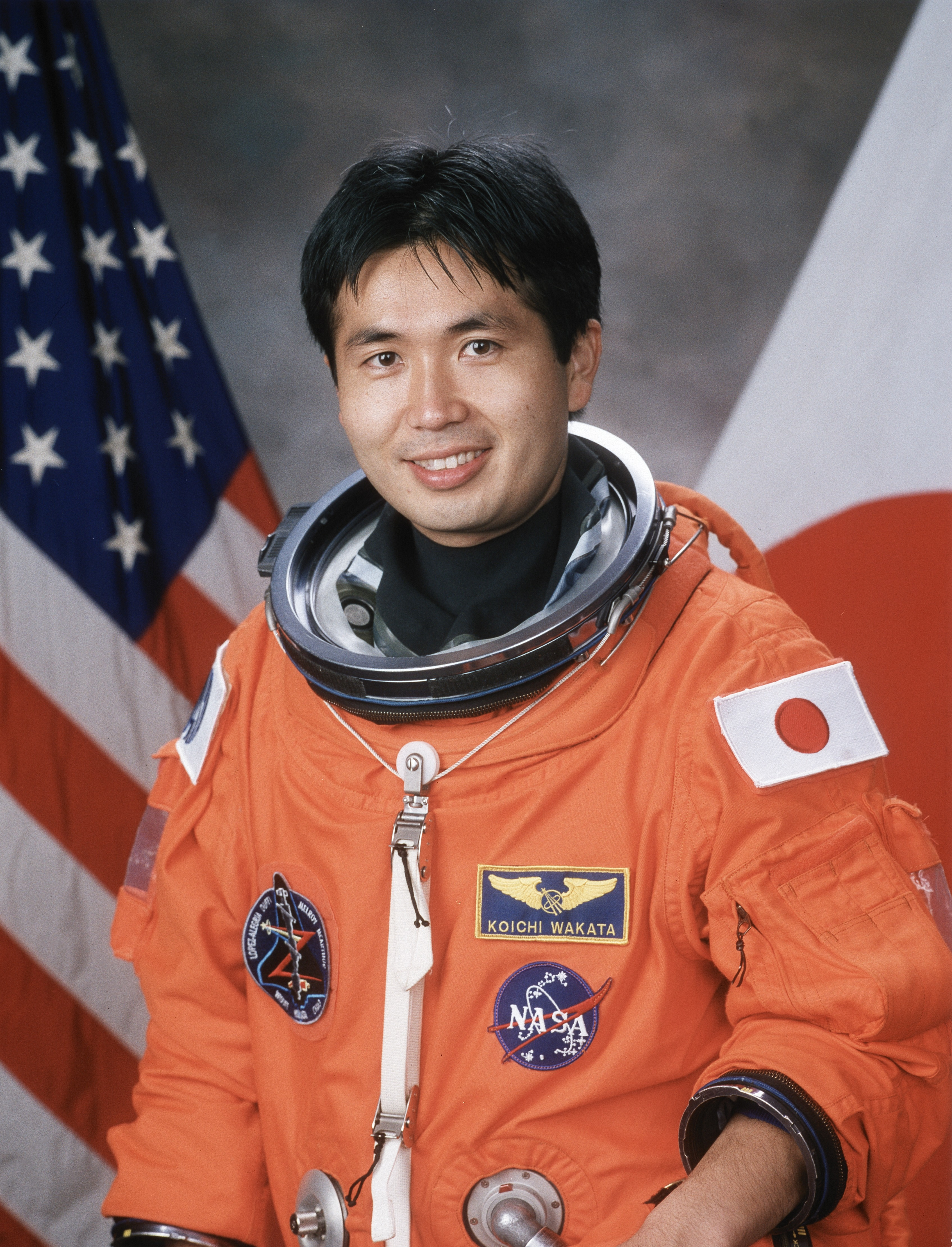 Koichi Wakata, STS-92 mission specialist